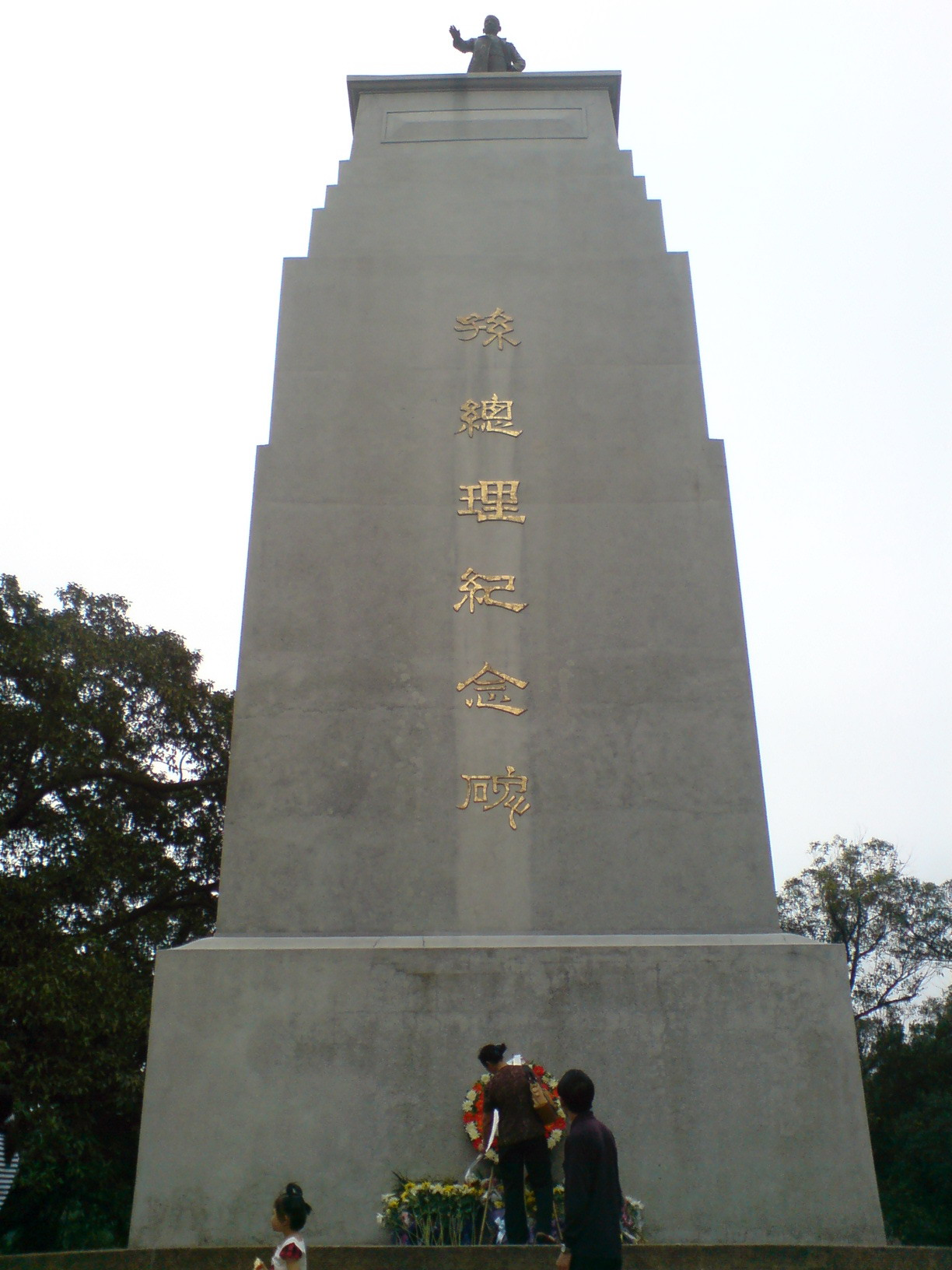 广州长洲岛的孙总理纪念碑